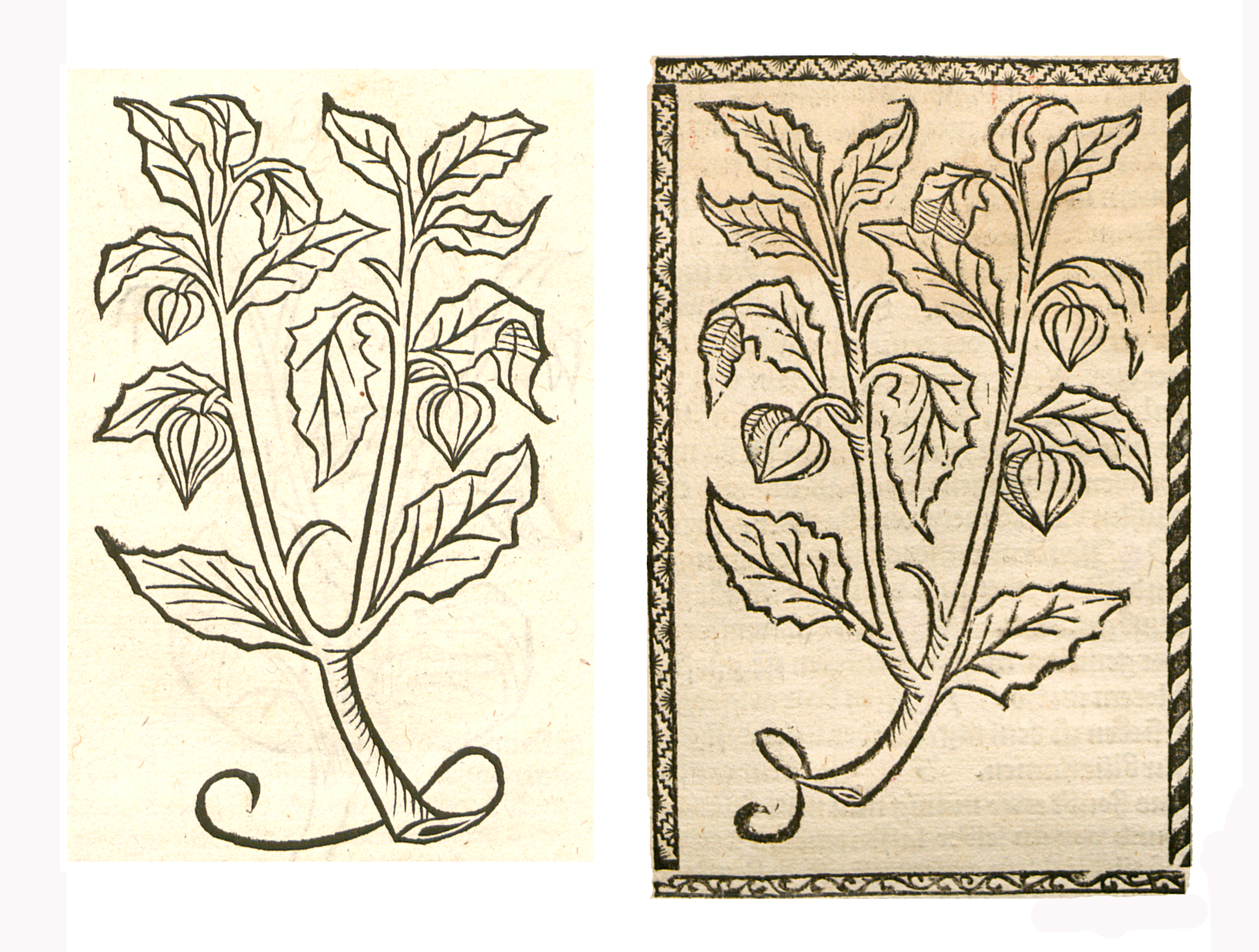 Abbildung von Juden kyrsen (Physalis alkekengi)